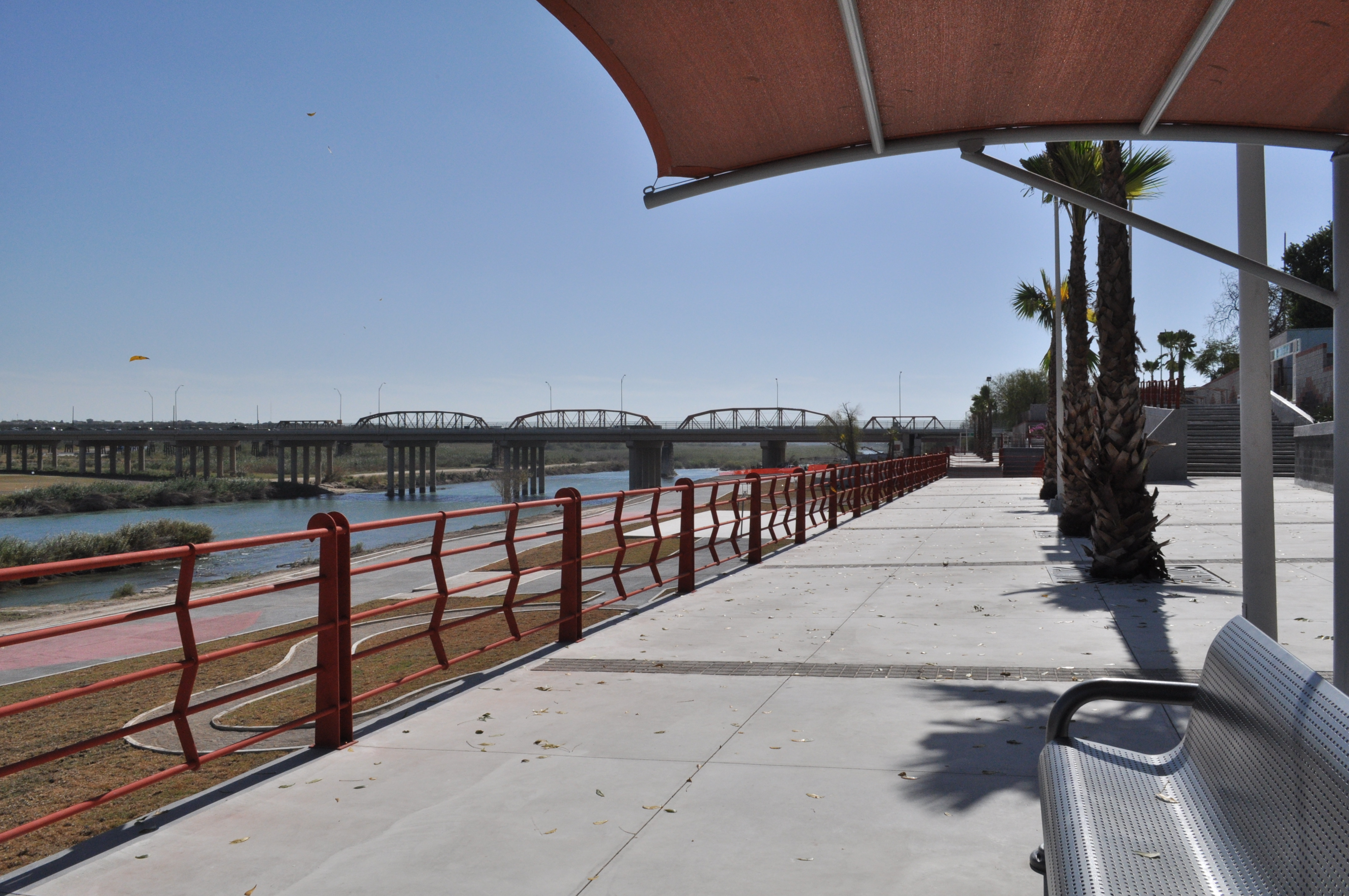 Paseo del Río (Piedras Negras, Coahuila)